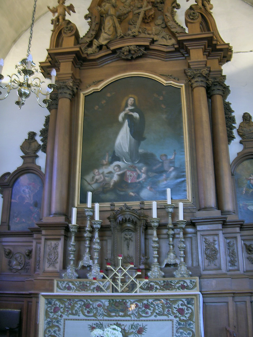 Side altar in the Kapucijnenkerk; Ostend, Belgium